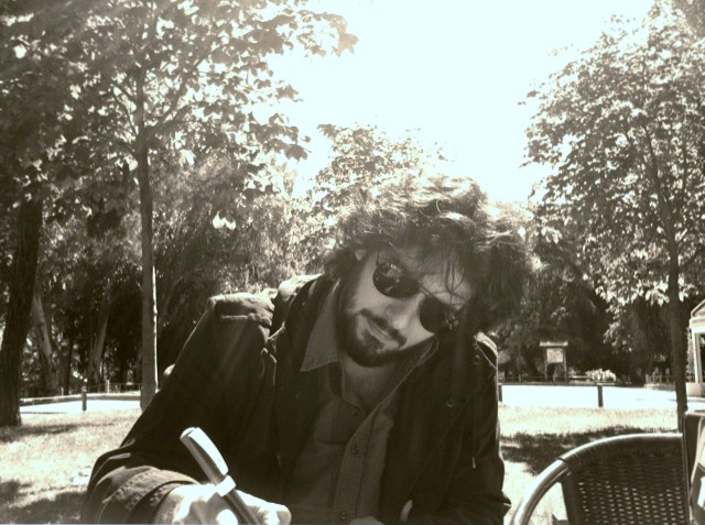 Paco Cifuentes en el Parque de Berlín, Madrid 2012.